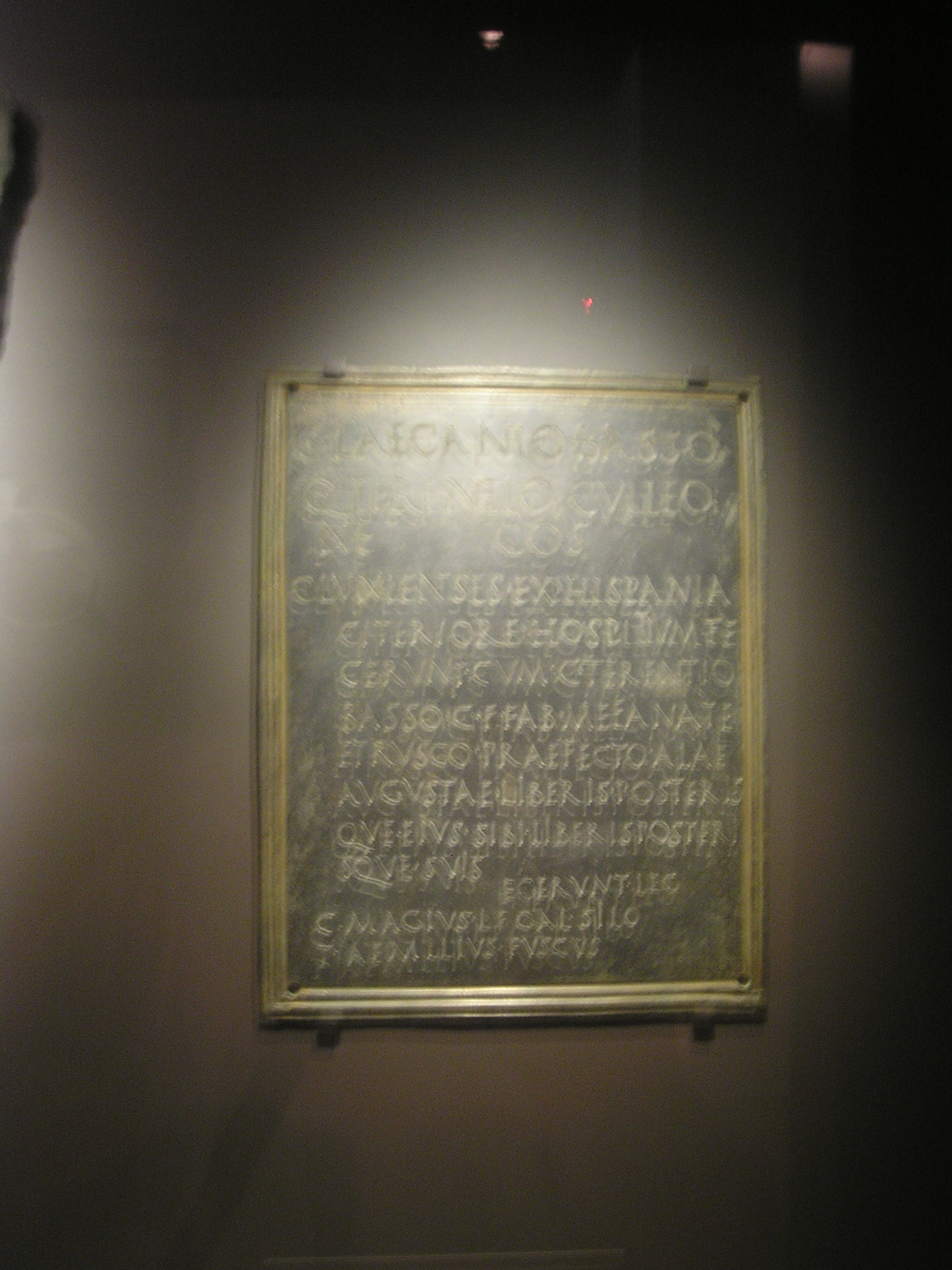 Tabula patronatus romana depositada en el Museo Arqueológico Nacional en Madrid (España), procedente de Peñalba de Castro (Burgos, España), correspondiente con CIL II 5792: C(aius) Laecanio Basso / Q(uinto) Terentio Culleo/ne co(n)s(ulibus) / Clunienes ex Hispania / citeriore hospitium fe/cerunt cum C(aio) Terentio / Basso C(ai) f(ilio) Fab(ia) Mefanate / Etrusco praefecto alae / Augustae liberis posteris/que eius sibi liberis posteri/sque suis / egerunt leg(ati) / C(aius) Magius L(uci) f(ilius) Gal(eria) Silo / T(itus) Aem lius Fuscus